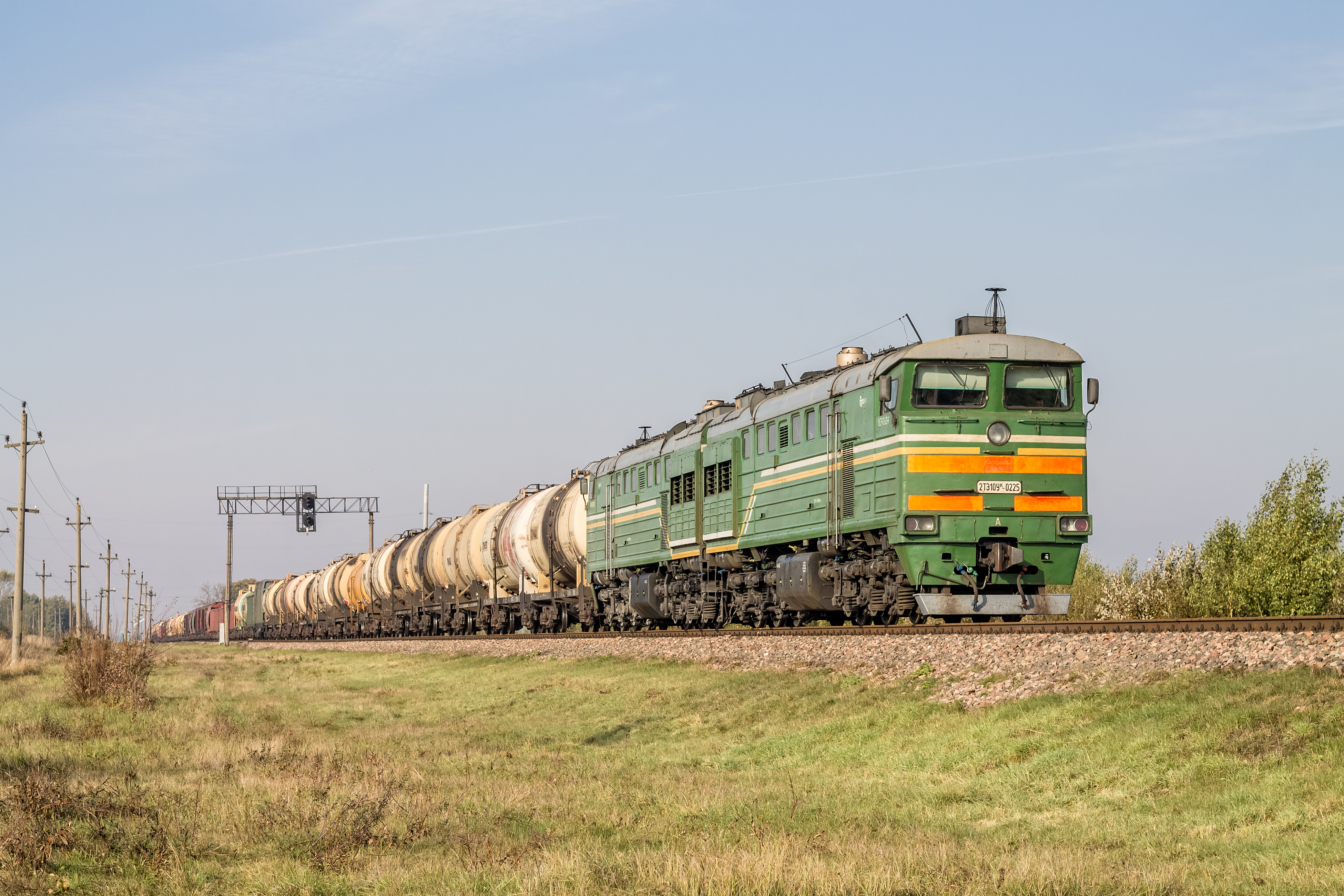 Тепловоз 2ТЭ10УК-0335, станция Молодечно см. фото 704848 в альбоме автора